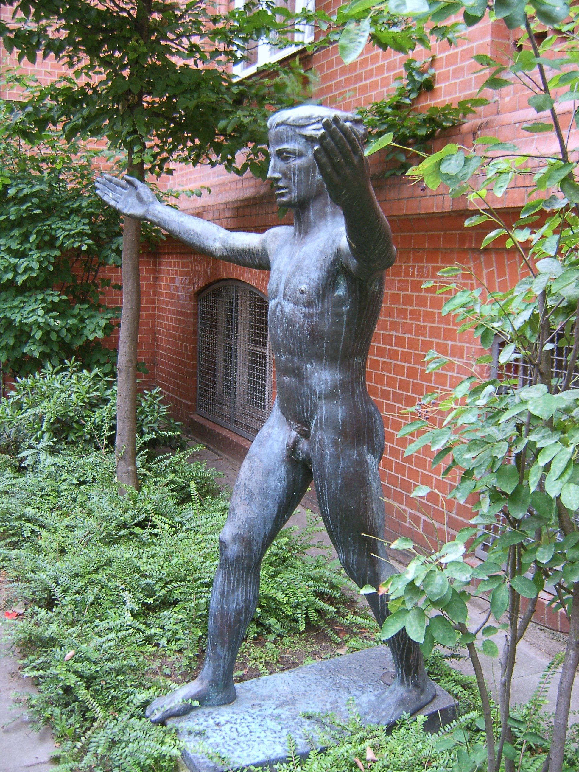 Skulptur vor dem Hamburger Schulmuseum in der Seilerstraße auf St. Pauli.